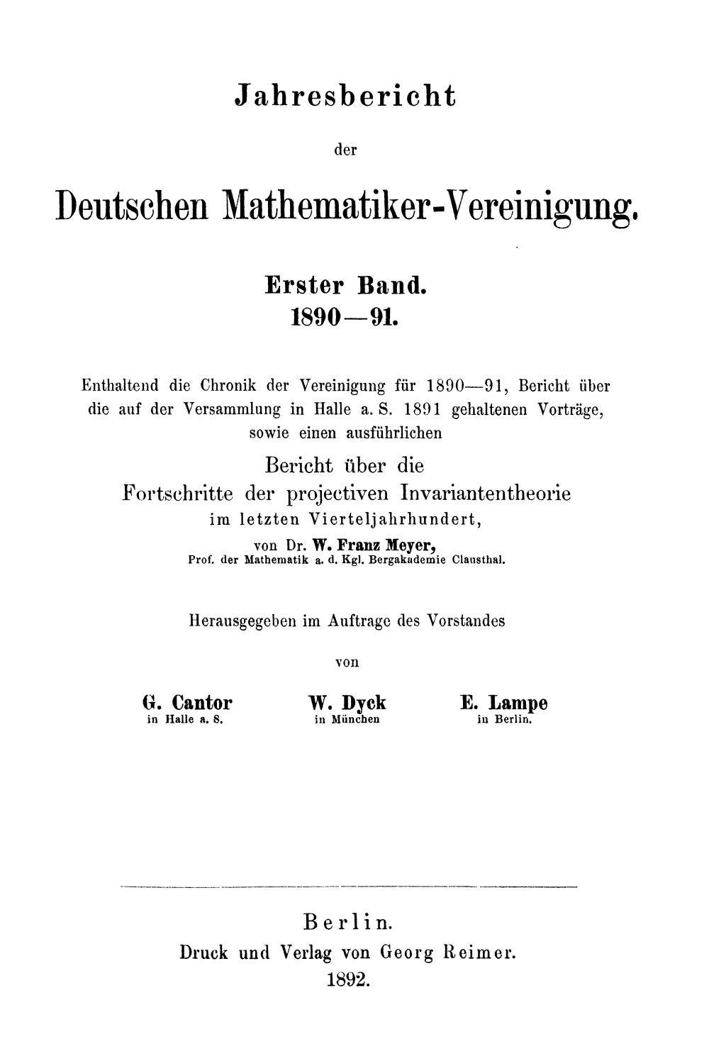 Titelseite der Zeitschrift / Title page of the periodical